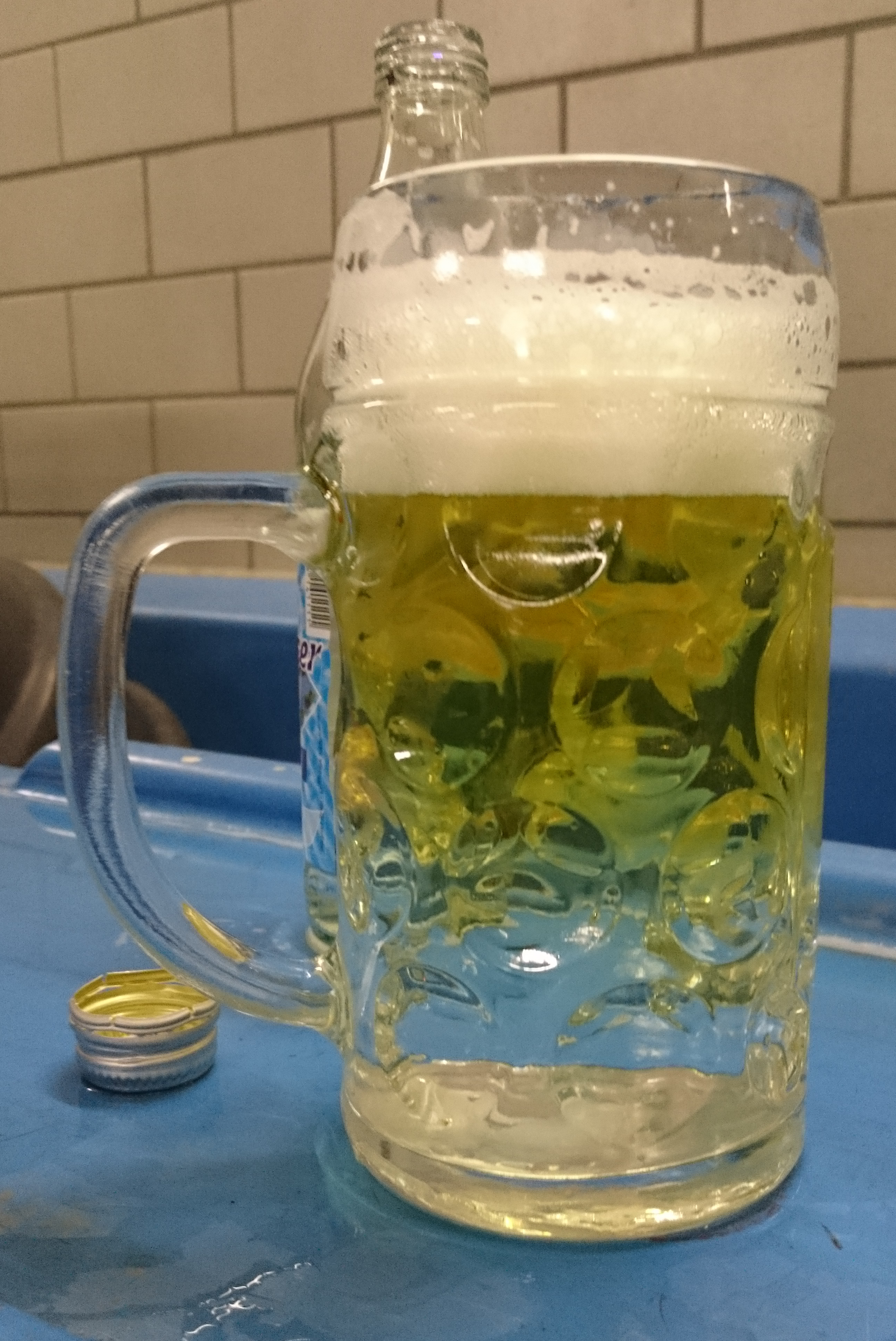 Radler (falsch eingeschenkt)